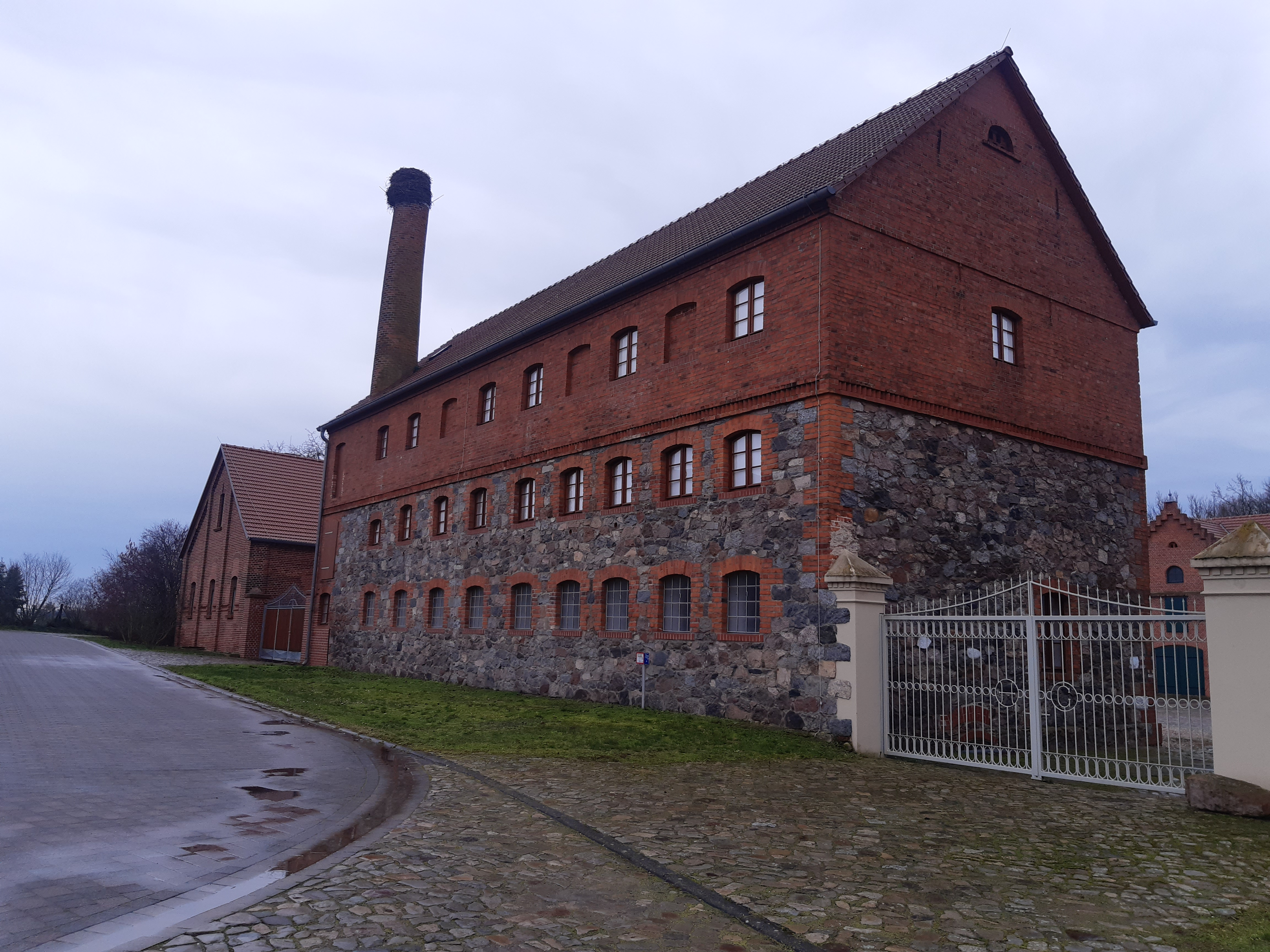 Fabrik